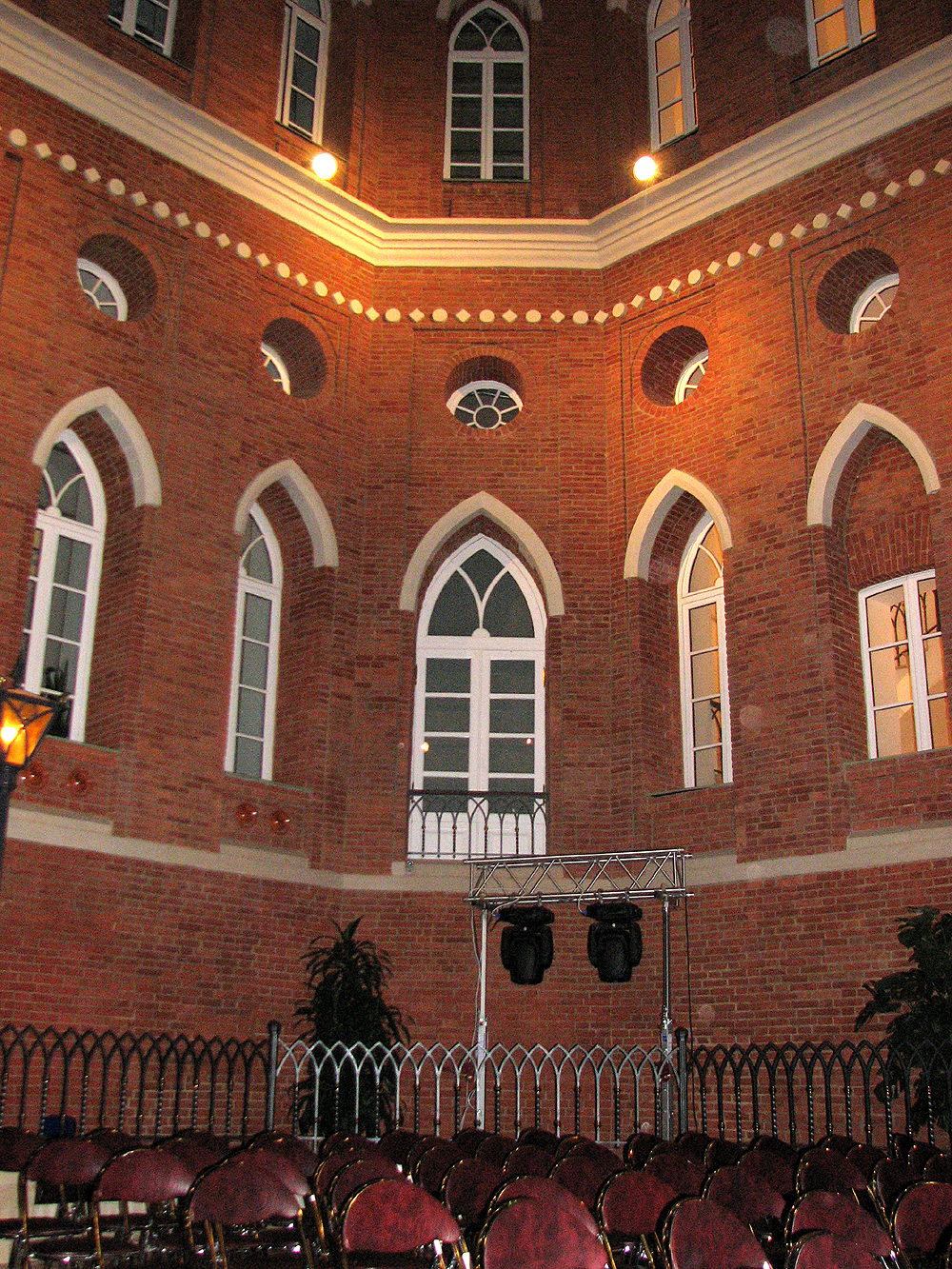 Атриум Хлебного дома в Царицыне.